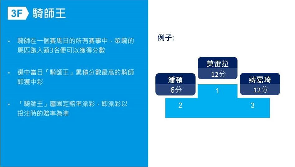 Jockey Challenge Sample